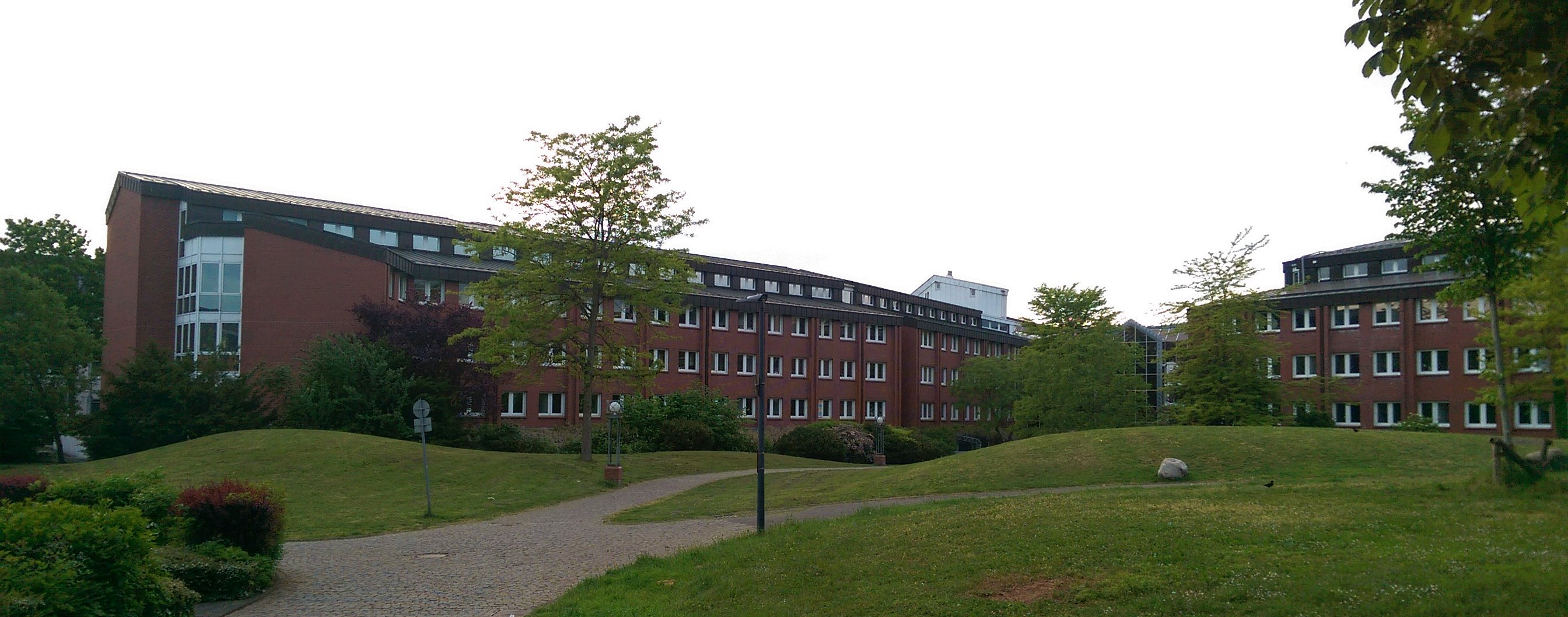 Finanzamt Trier, Hubert-Neuerburg-Straße